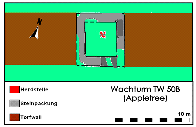 Befundskizze Wachturm 50B (TW) Appltree, Hadrianswall, 2. Jahrhundert n.Chr.